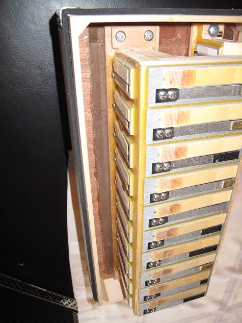 L Förmiger Helikonbass wie in vergleichbaren Akkordeon mit Helikonbässen